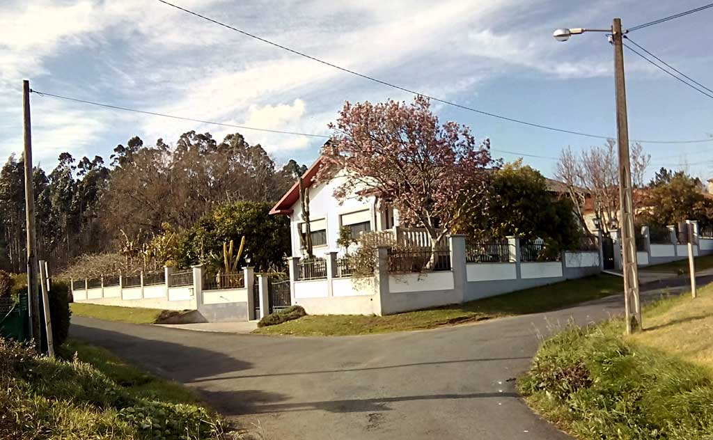 Vista do Vilar, Narón.